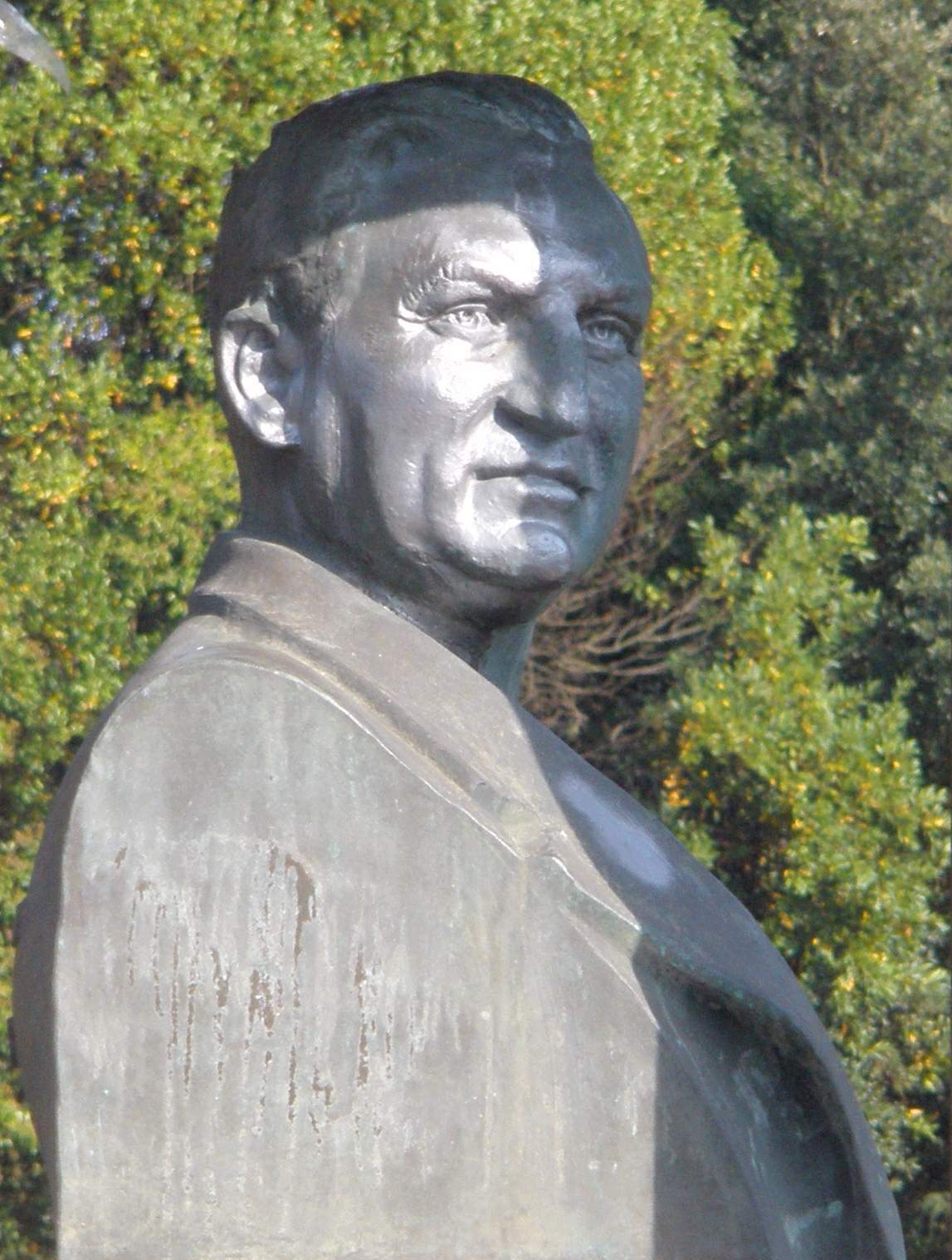 Monumento a Simón de Otxandategi, en Berango (Vizcaya)